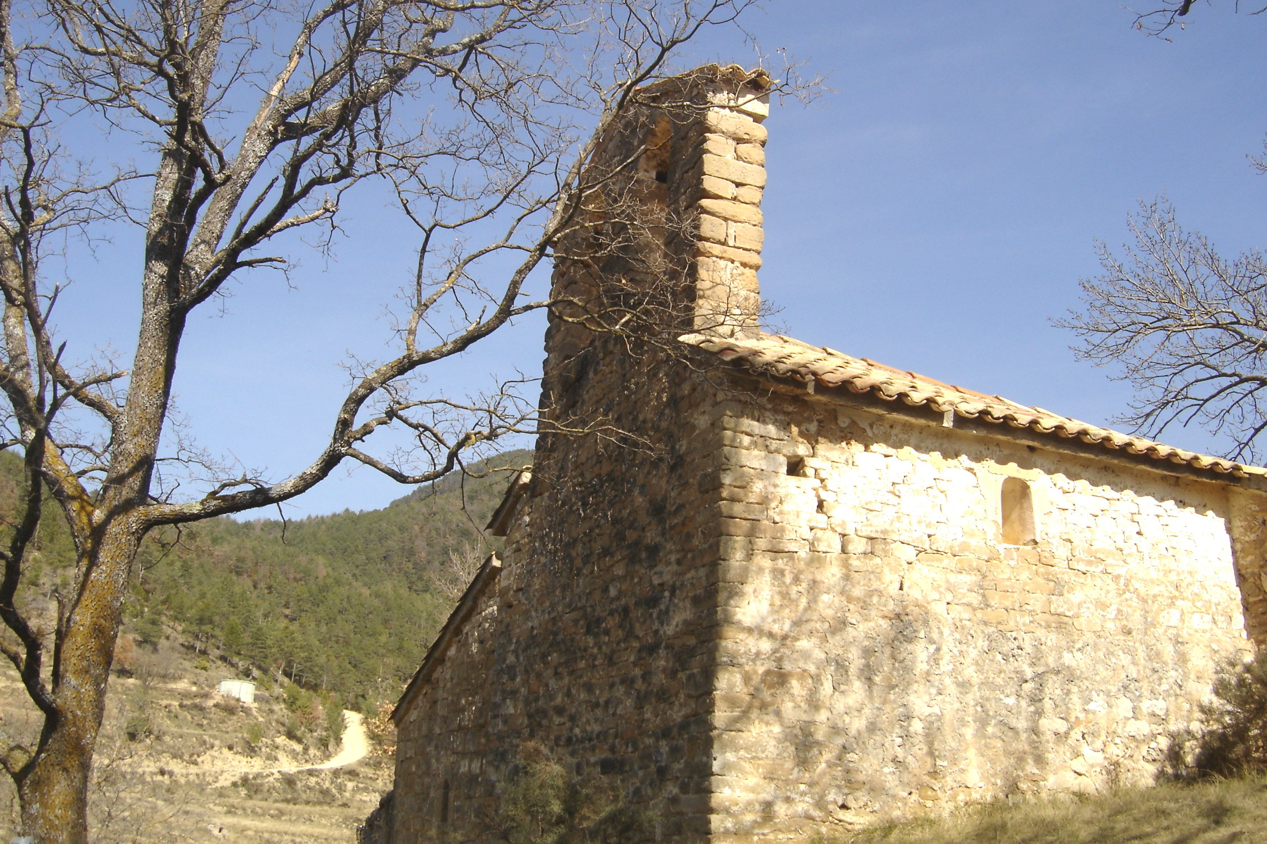 Façana meridional de l'ermita de Sant Lleïr de Casabella, al municipi de La Coma i la Pedra, a la Vall de Lord (Solsonès).